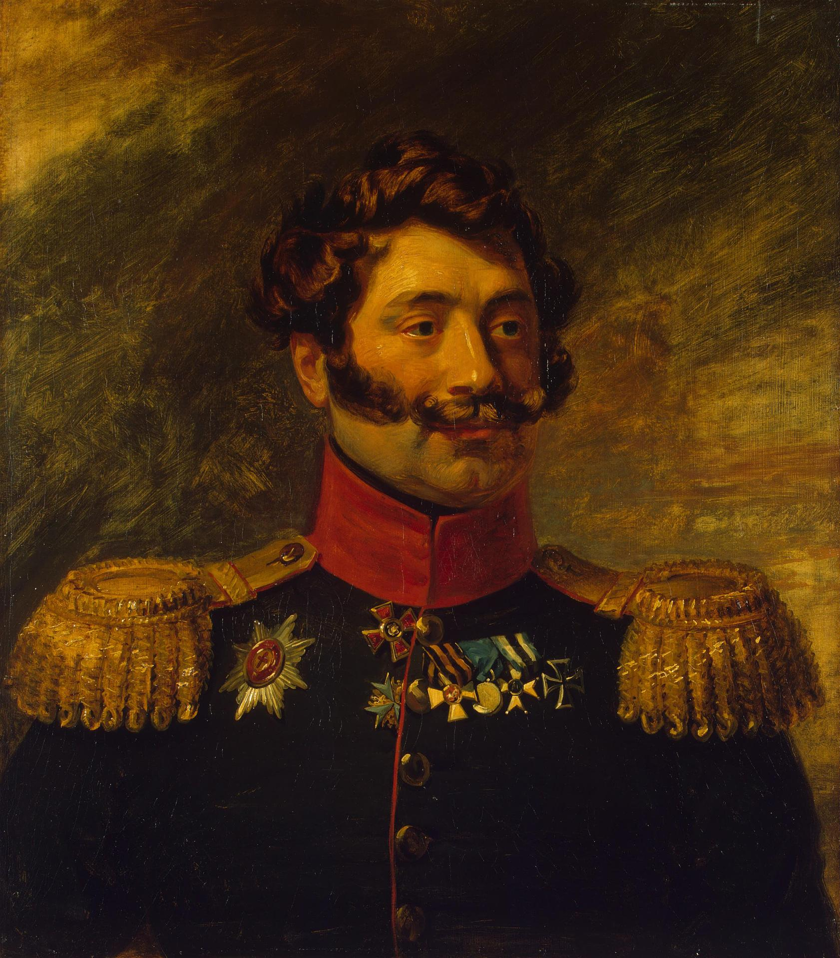 Stepan Alexandrovich Hilkov (1785 – 1854) russian general